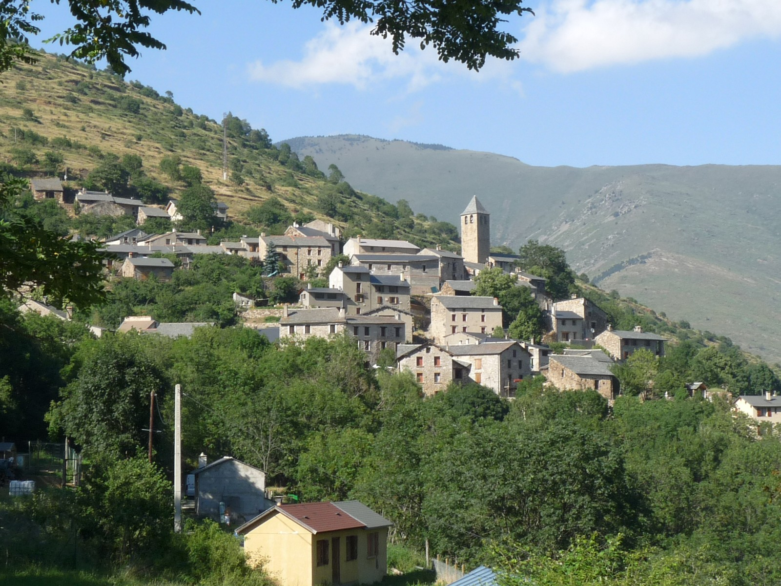 Ayguatébia, Pyrénées-Orientales, France